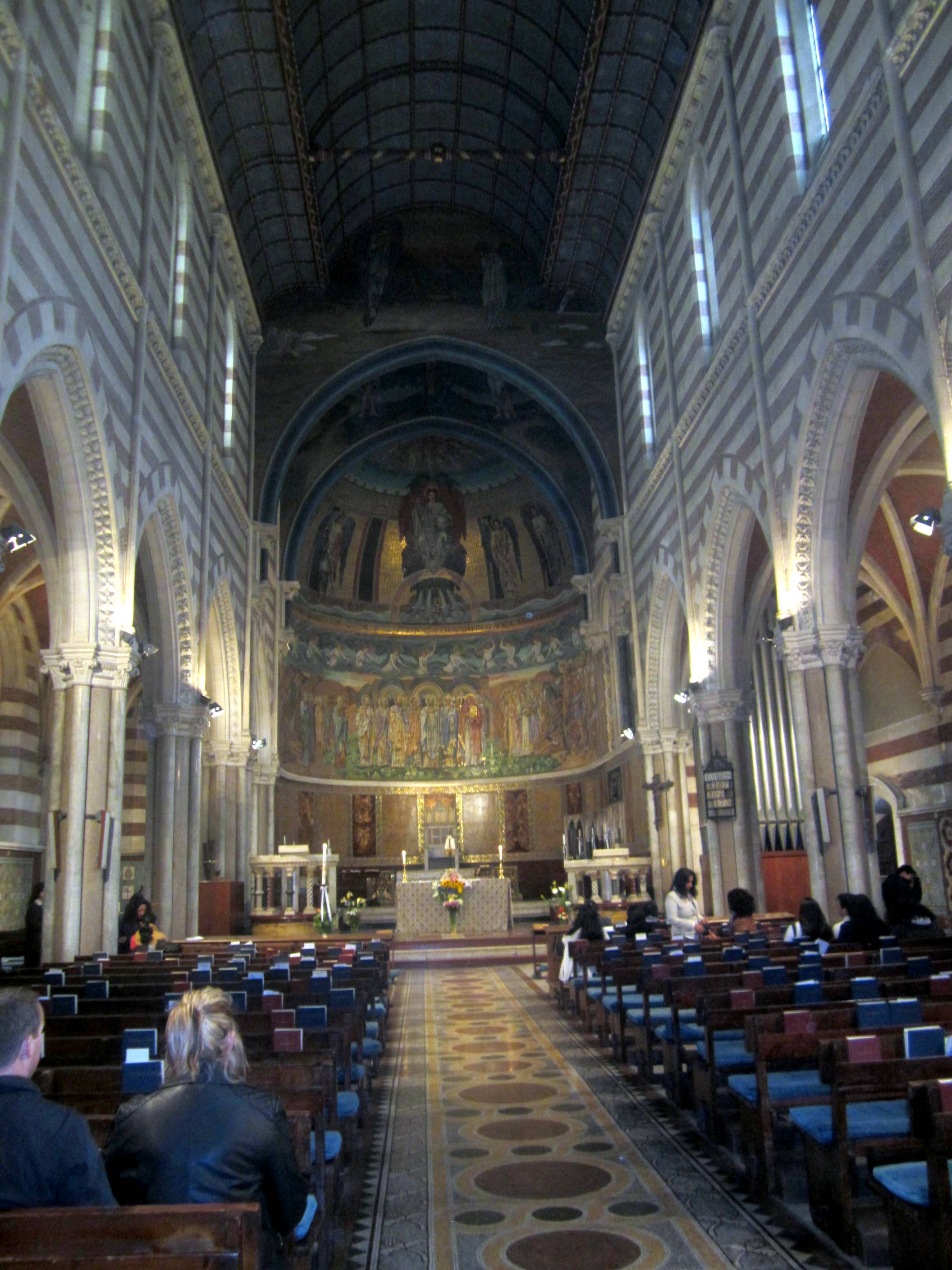 Interno della Chiesa di San Paolo nelle Mura, Roma